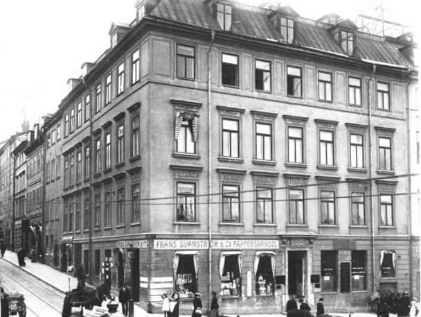 Hans Marschalcks hus före 1907 (Hornsgatan 4 har ännu sin gamla fasad kvar)